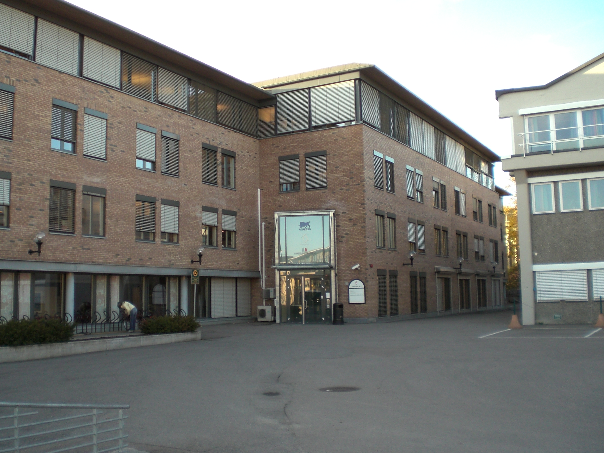 Hovedkvarteret til IT-selskapet Agresso, i Nydalen, Oslo